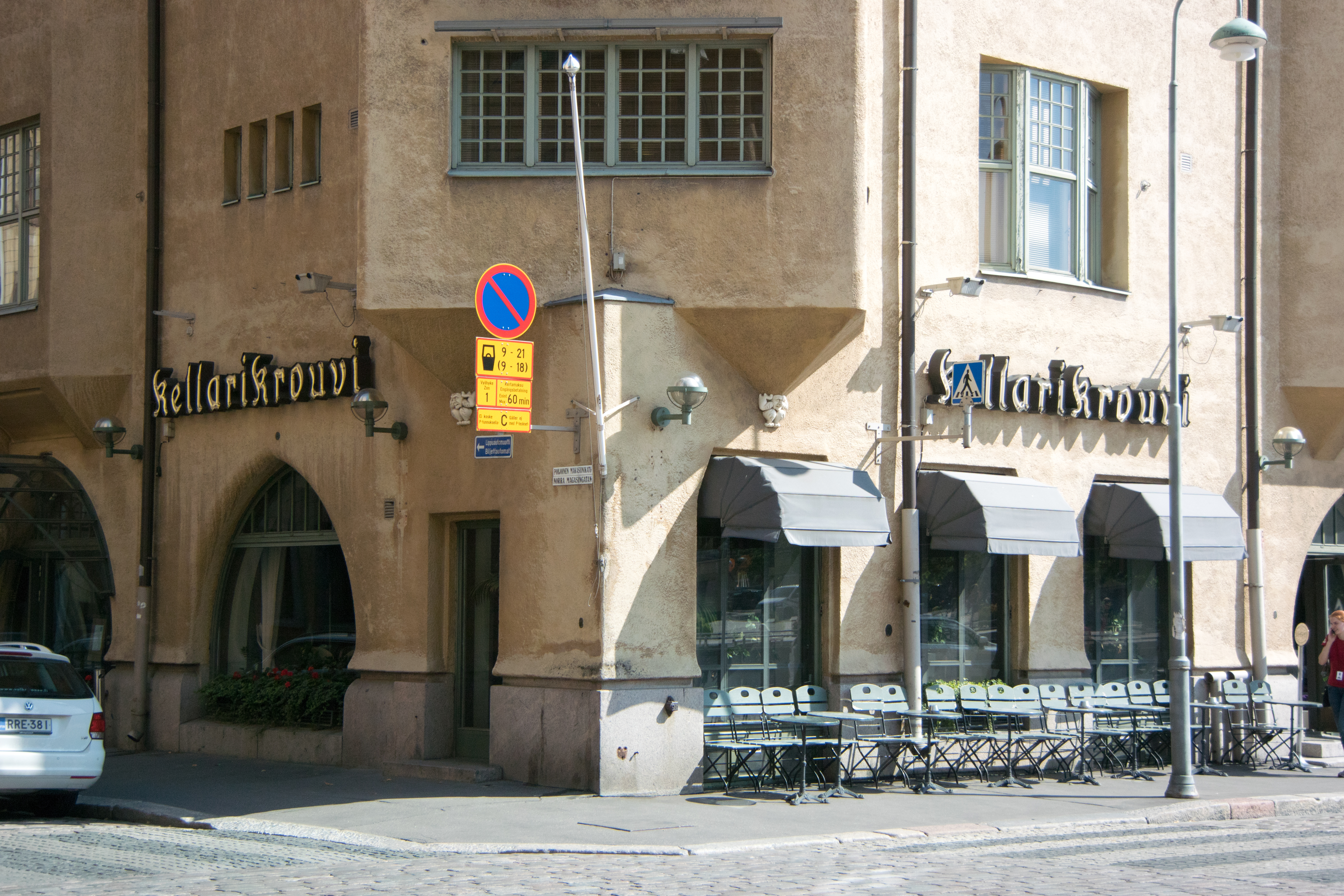 Kellarikrouvi helsingissä